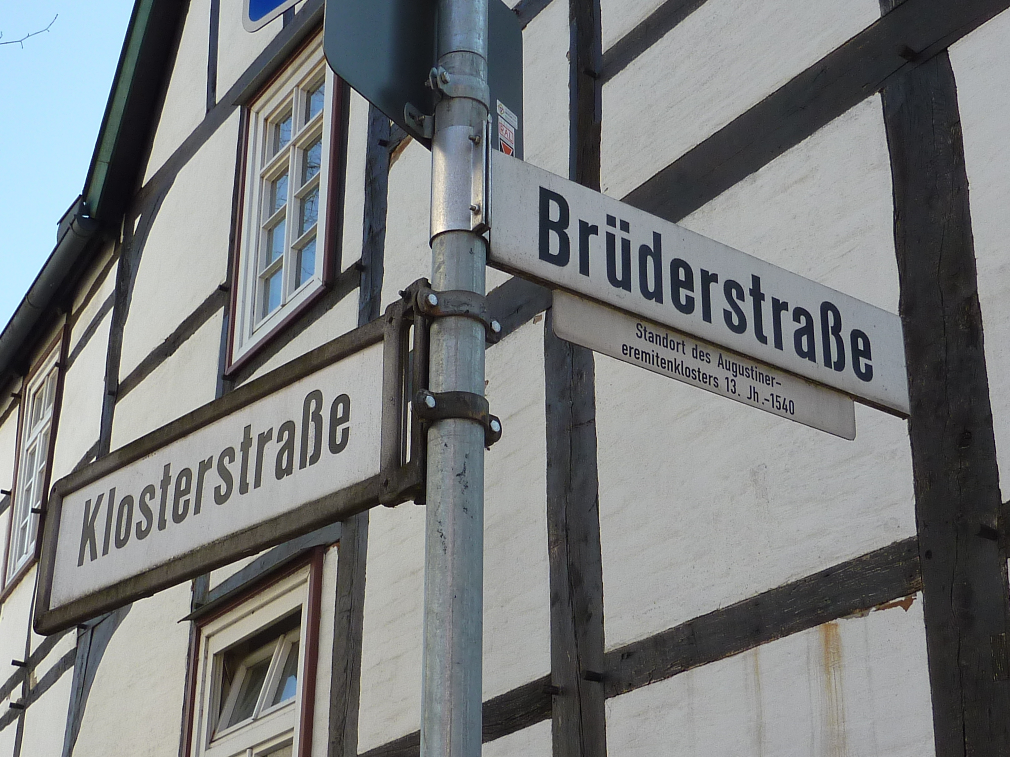 Hinweisschild Augustiner-Eremitenkloster Herford